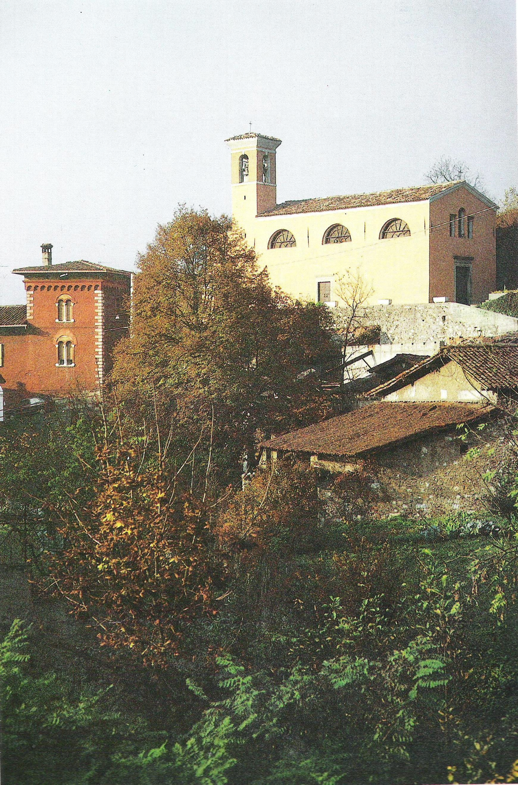 La Chiesa di San Lorenzo in Odolo (BS) in contrada Forno, sopra il fiume Vrenda